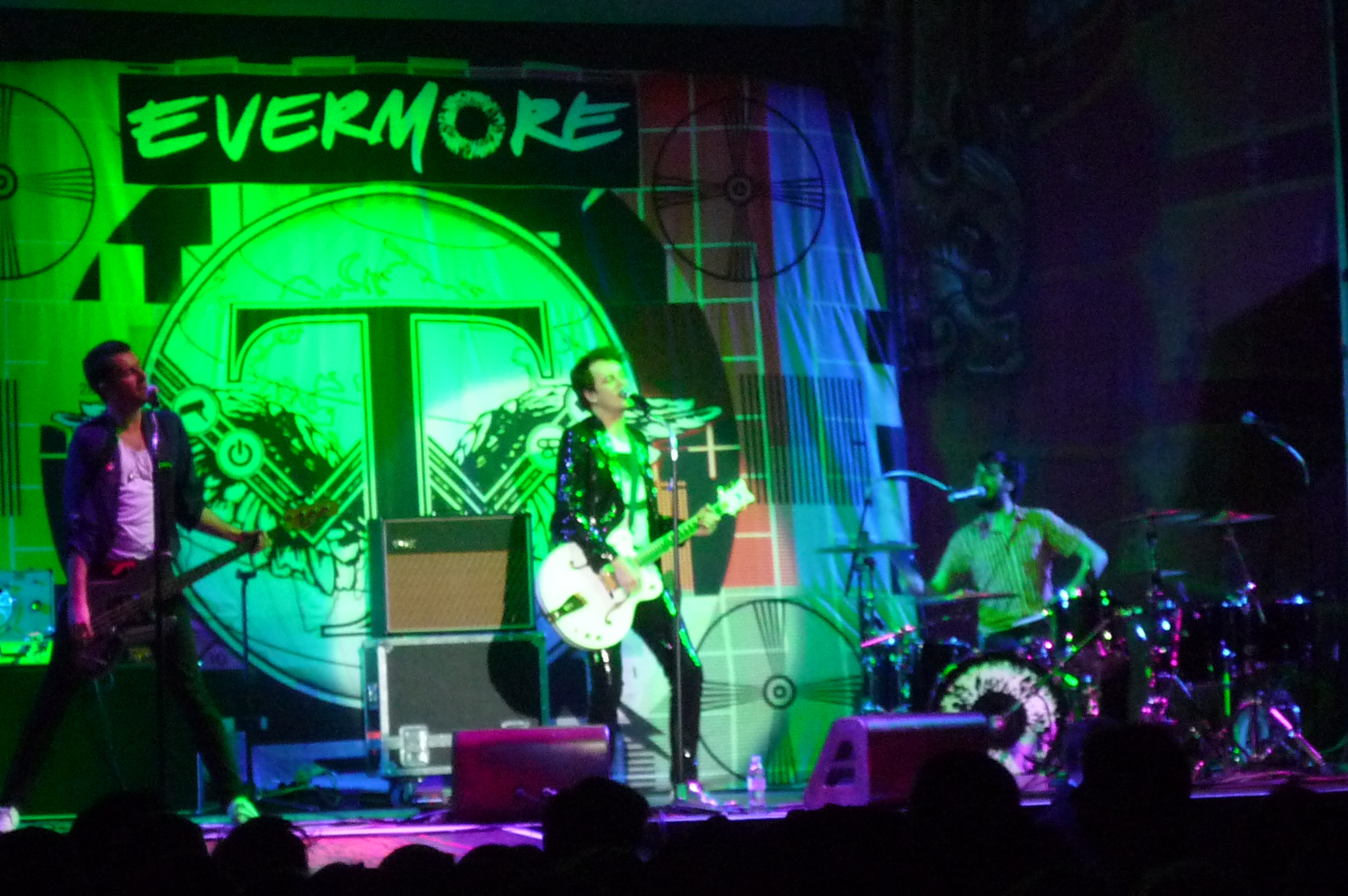 Evermore in Freiburg als Vorband für P!nk im Rahmen der Funhouse-Tour